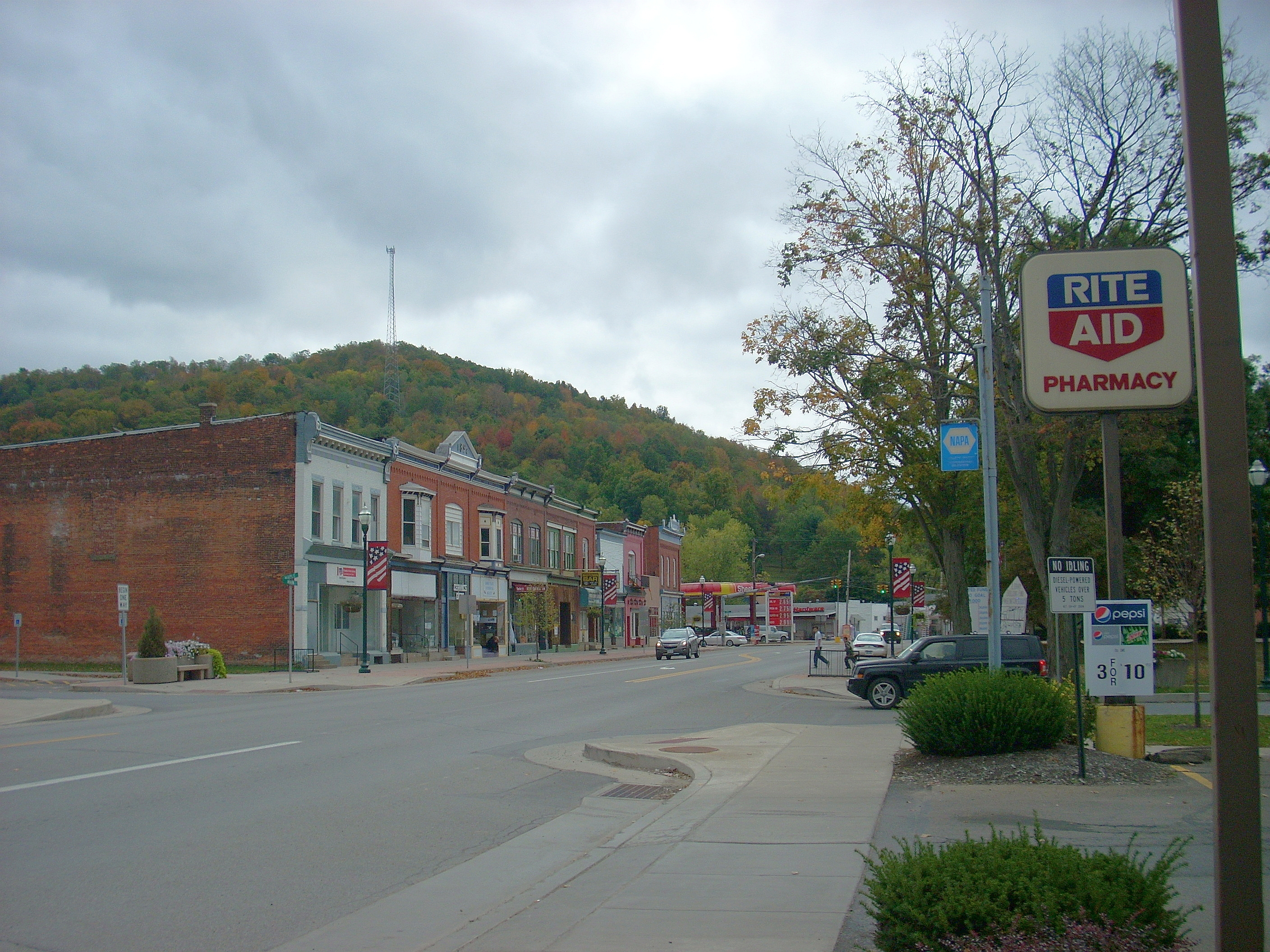 Port Alleghany